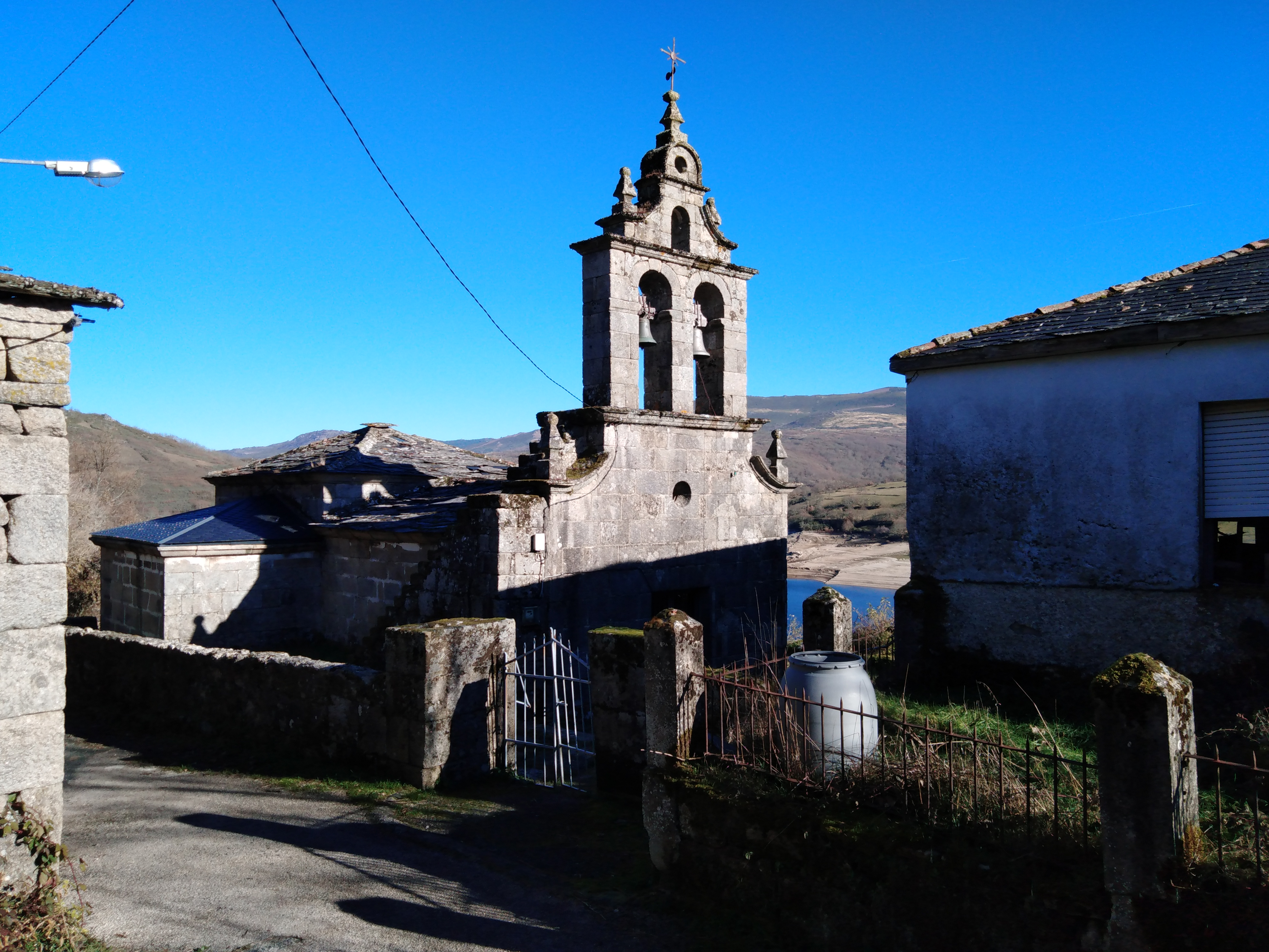 Igrexa parroquial do Candedo